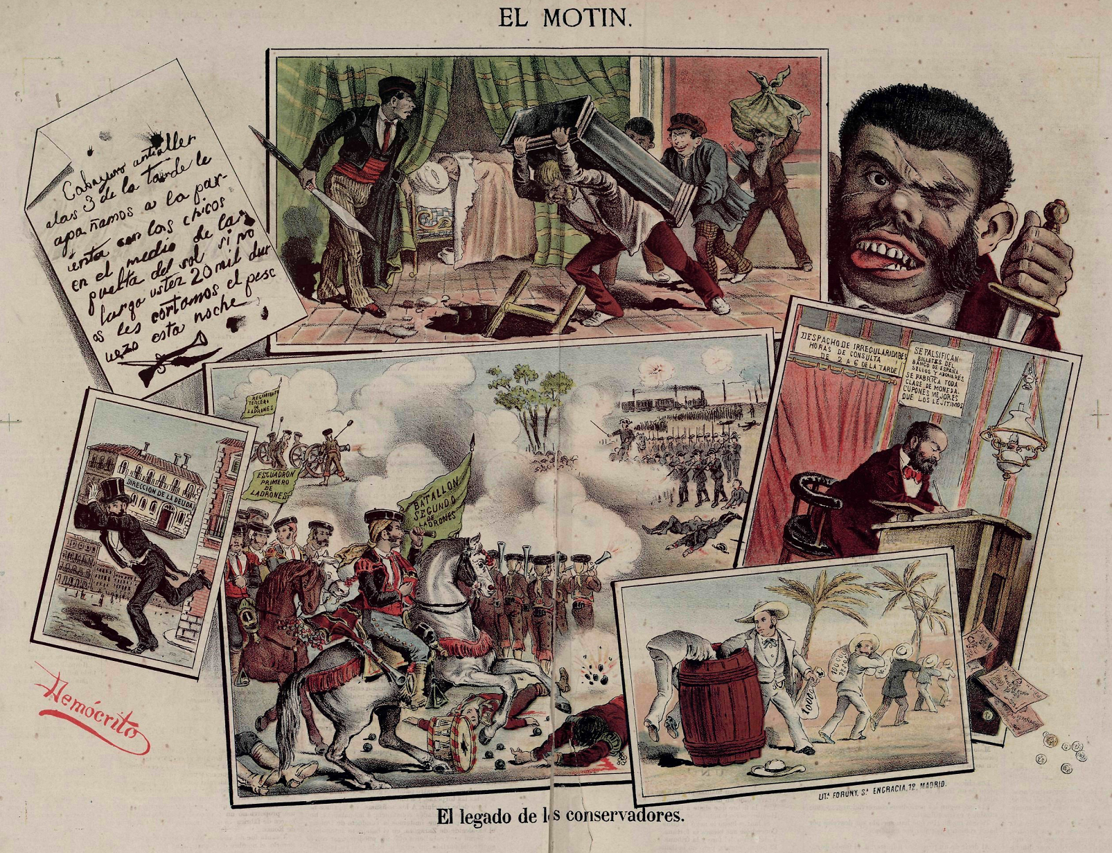 El legado de los conservadores, de Eduardo Sojo «Demócrito, publicada en la revista satírica española El Motín.